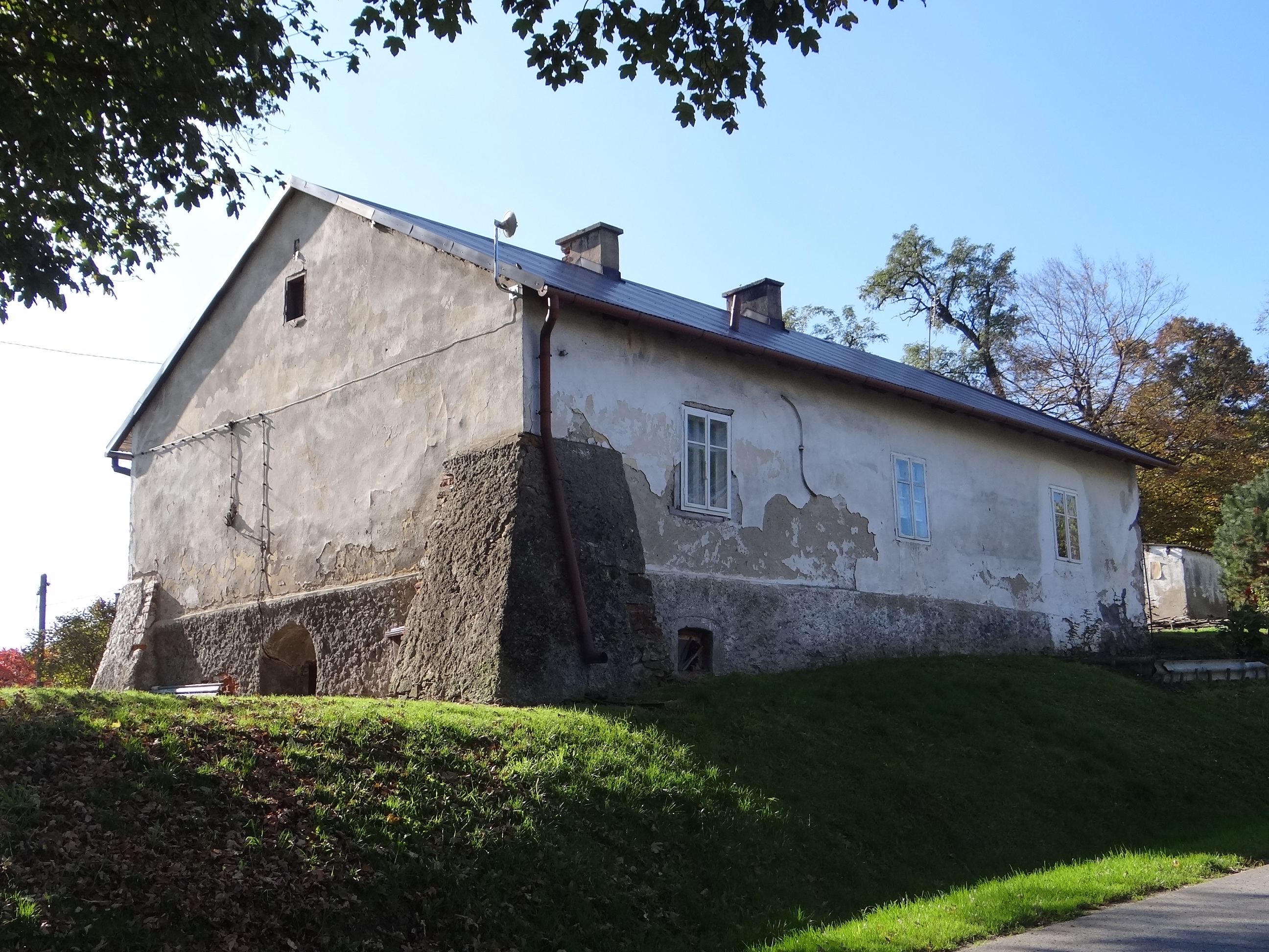 Budynek przy dworze w Łazanach